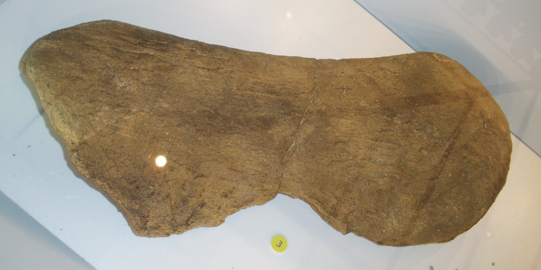 Fossil of Magyarosaurus, a sauropod dinosaur Took the photo at Musee d'Histoire Naturelle, Brussels